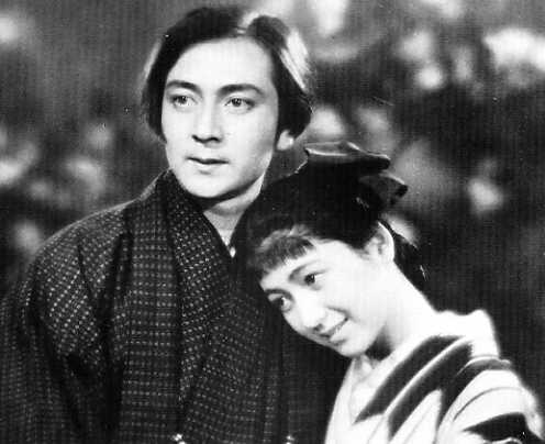 『巨人傳』、1938年、スチル写真